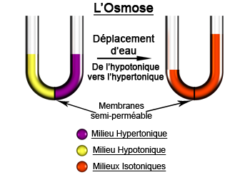 Tube à osmose avec membrane semi-perméable montrant la diffusion libre.